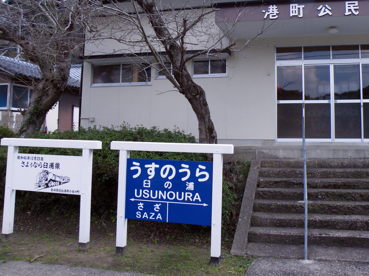 旧国鉄臼ノ浦線臼ノ浦駅跡